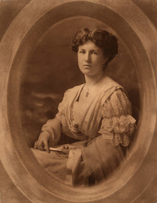 Portrait de Thaïs Lacoste-Frémont, (1904)